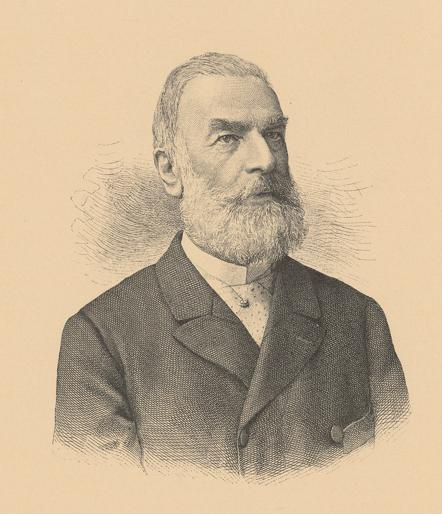 Achilles Thommen. Druckgrafik aus der Reihe "Schweizerische Portrait-Gallerie", verlegt bei Institut Orell Füssli